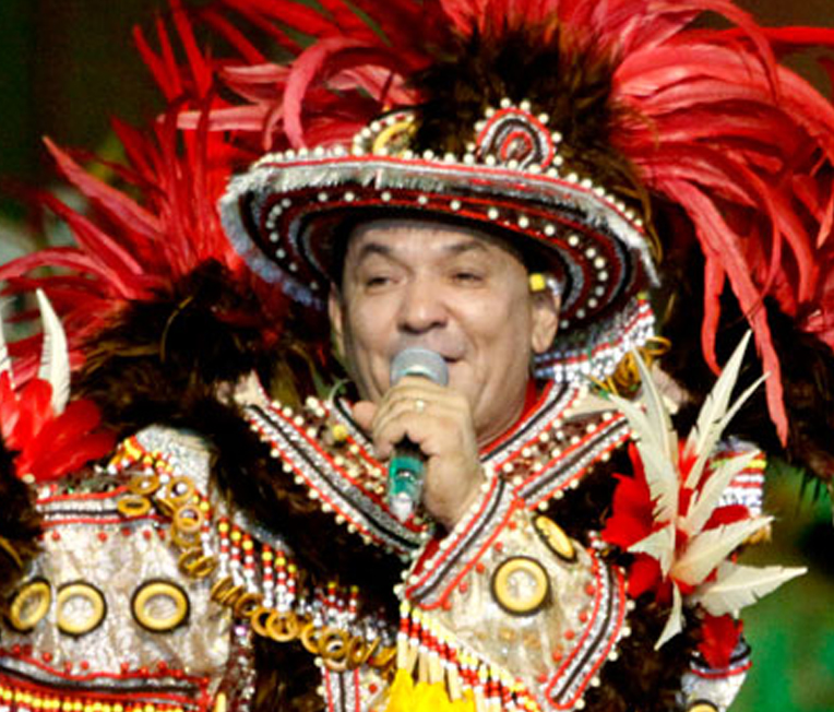 Amo do Boi